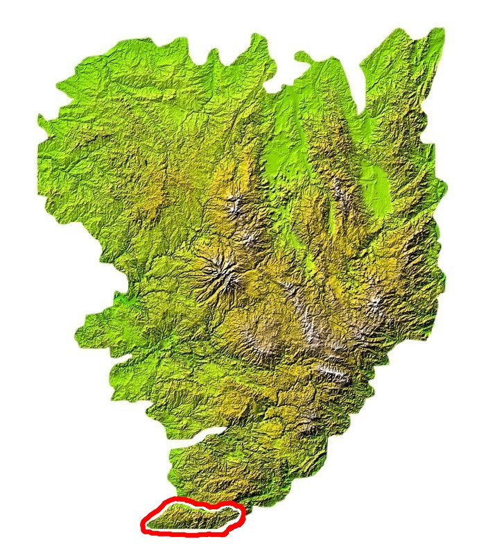 Situation de la Montagne Noire sur la carte du Massif central